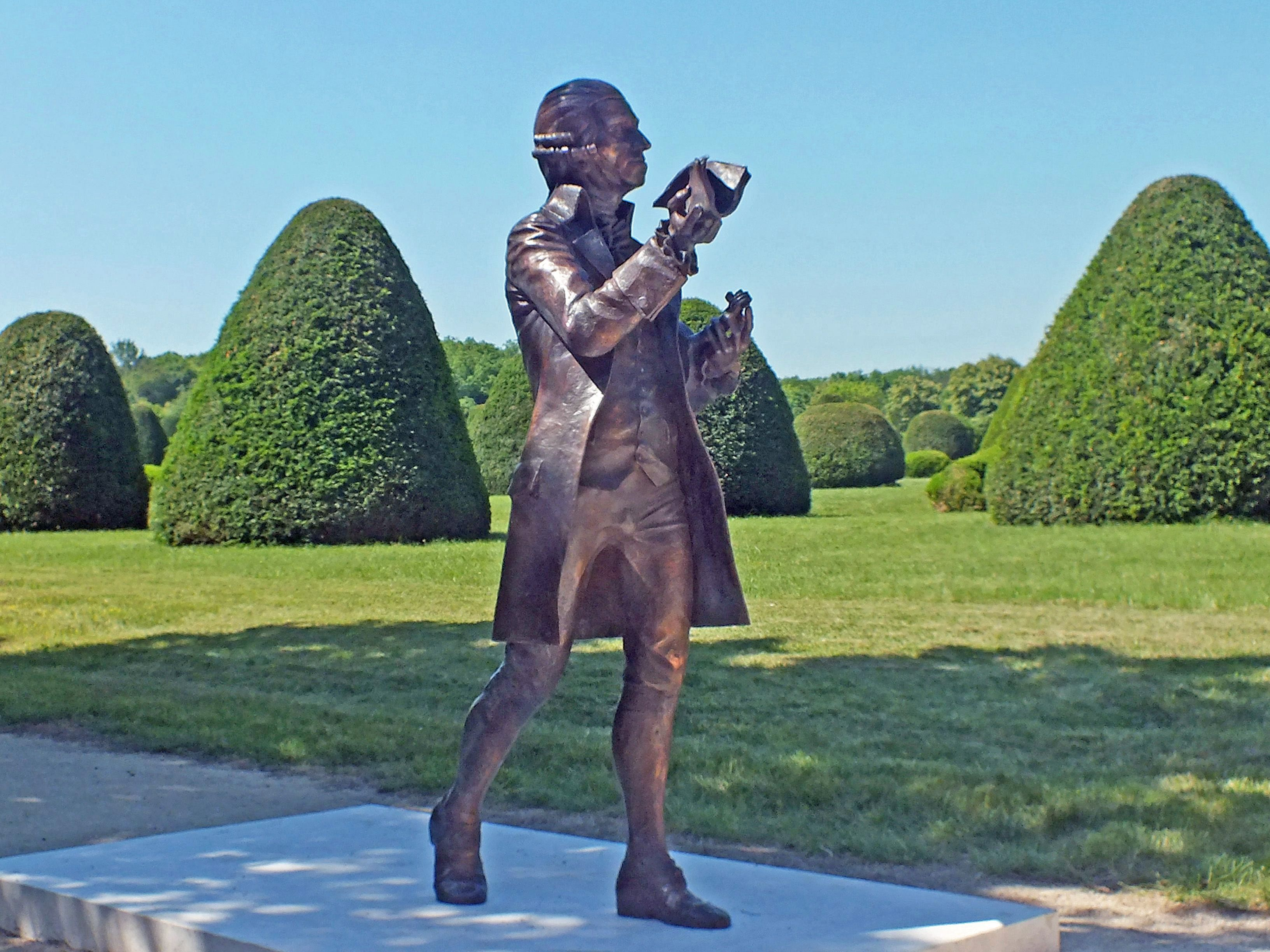 Bronzeplastik Joseph Haydn im Park des Schlosses Esterháza in Fertöd (Ungarn)